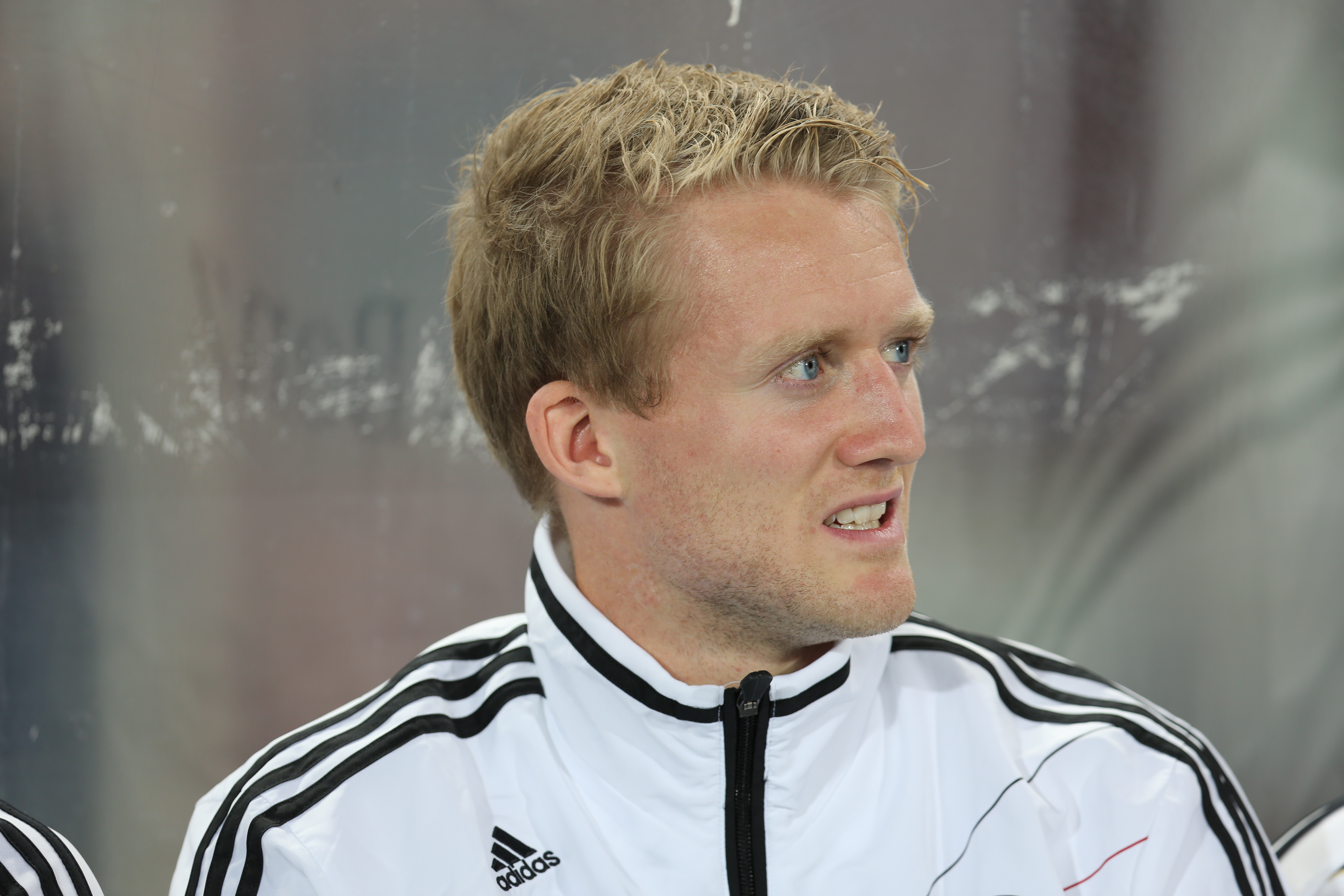 Fußball-Weltmeisterschaft 2014/Qualifikation (UEFA), Gruppe C, 11. September 2012, Österreich gegen Deutschland im Wiener Ernst-Happel-Stadion. The making of this work was supported by Wikimedia Austria. For other files made with the support of Wikimedia Austria, please see the category Supported by Wikimedia Österreich.